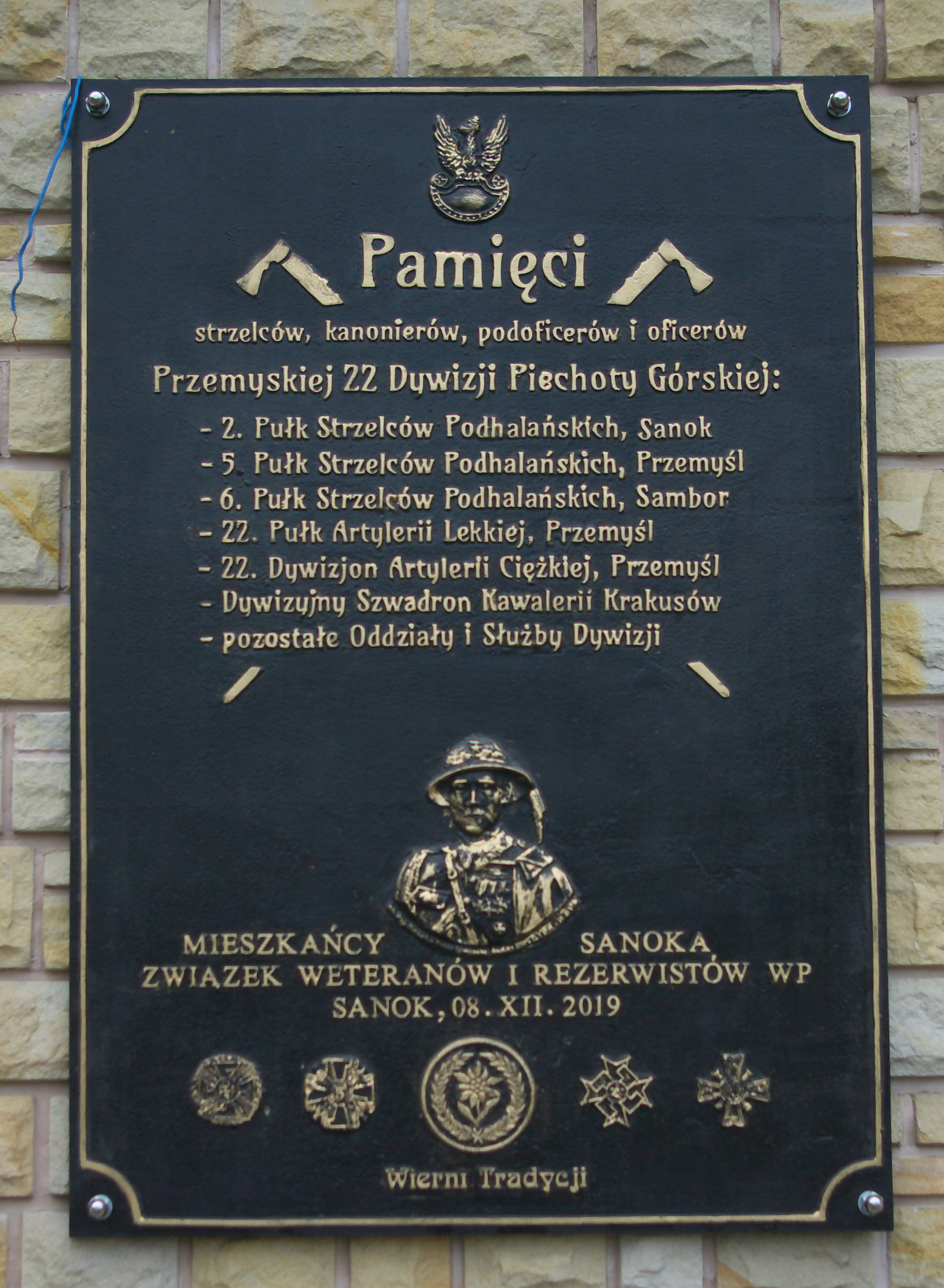 Upamiętnienie Wojska Polskiego II RP na Placu Harcerskim w Sanoku (2019).